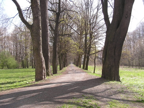 Tachov, Knížecí alej k minerálnímu prameni